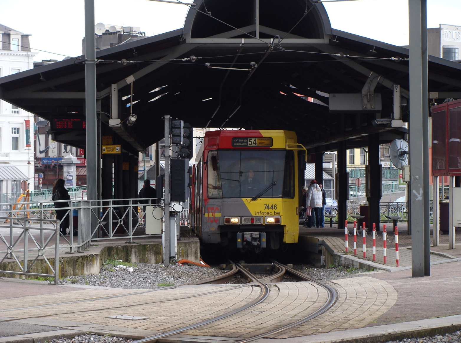 Métro 54 partant de la station Charleroi-Sud